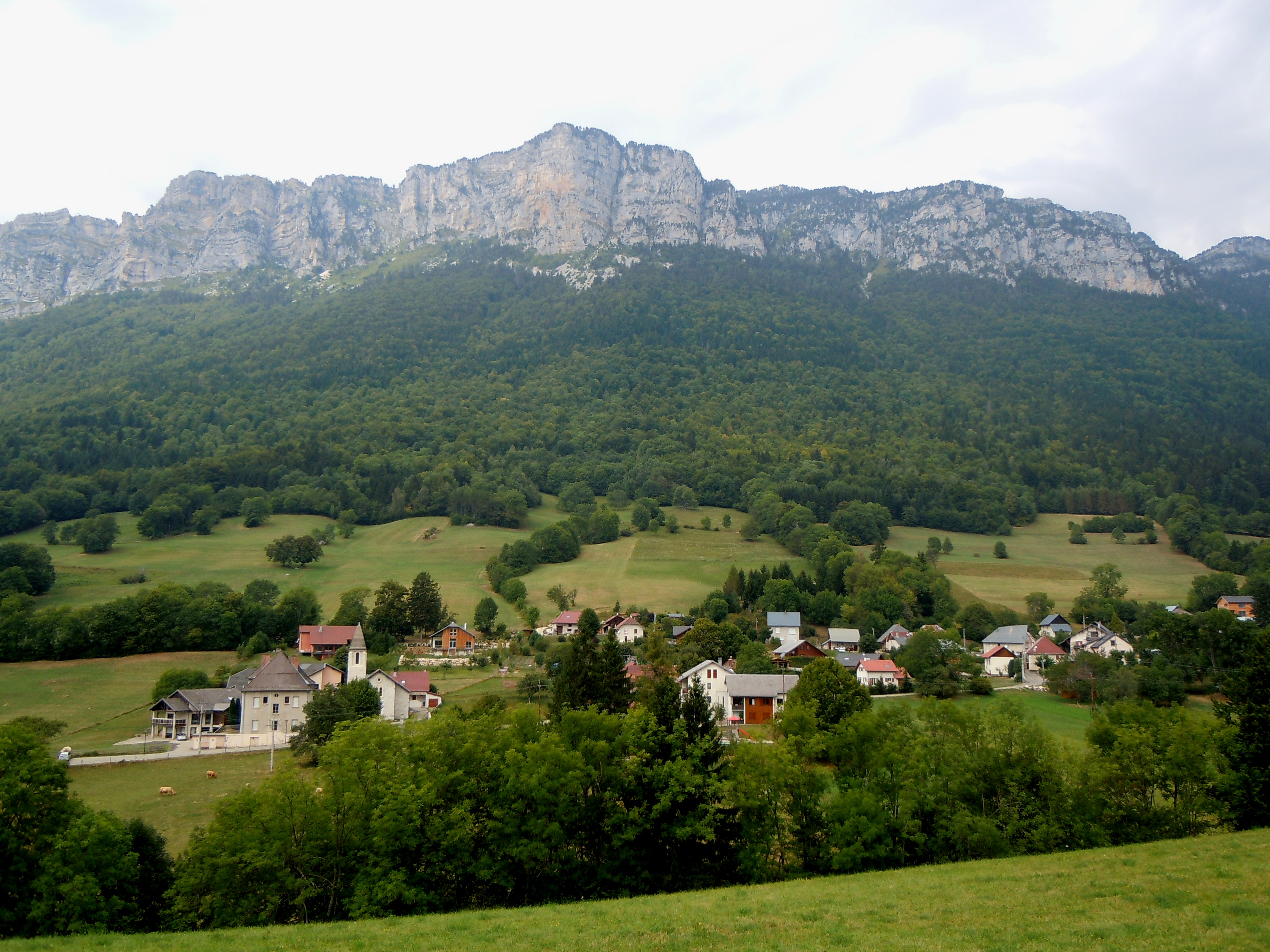 Sainte-Marie-du-Mont (Isère) - Vue générale du hameau les Prés